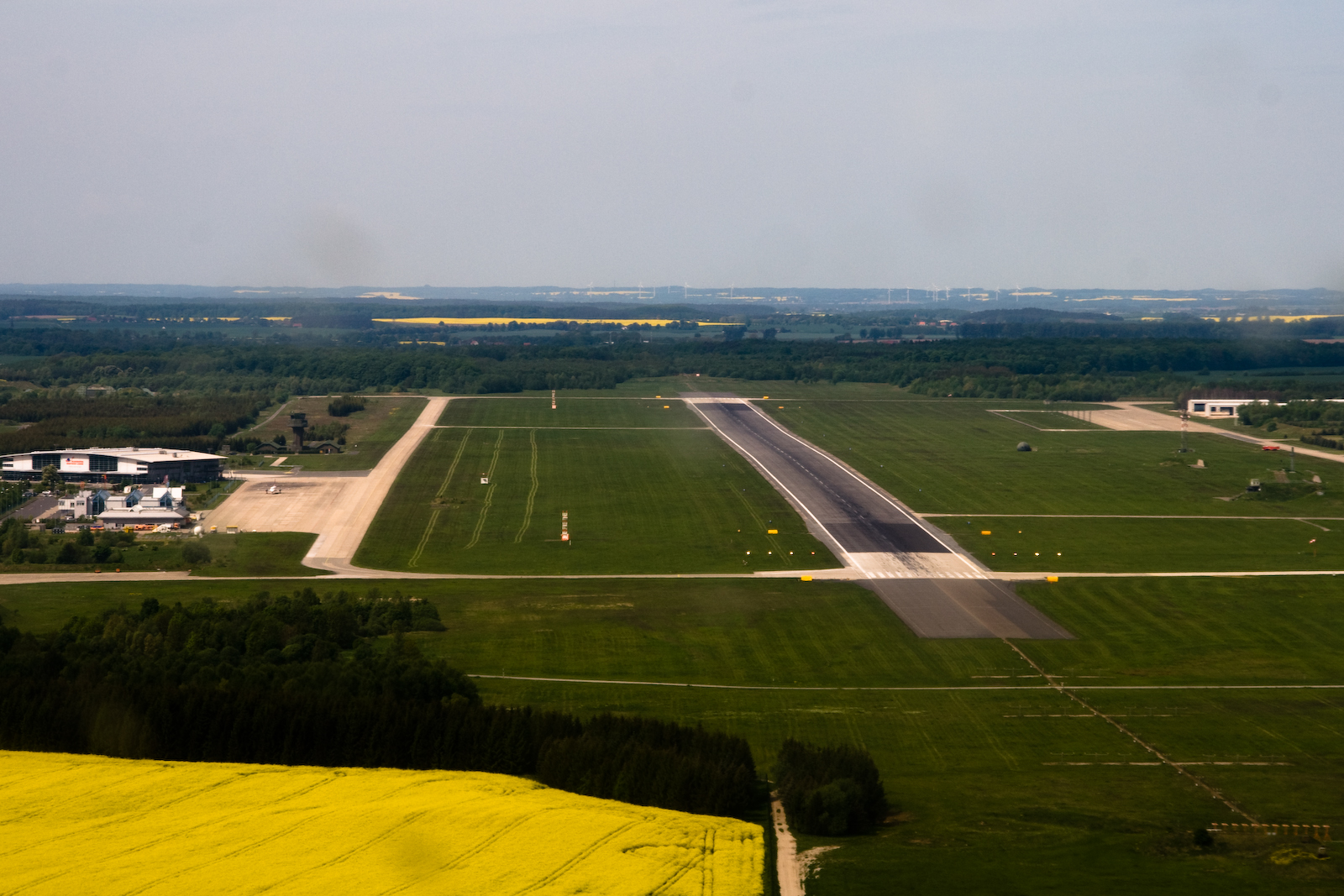 Anflug auf den Flughafen Rostock Laage aus östlicher Richtung